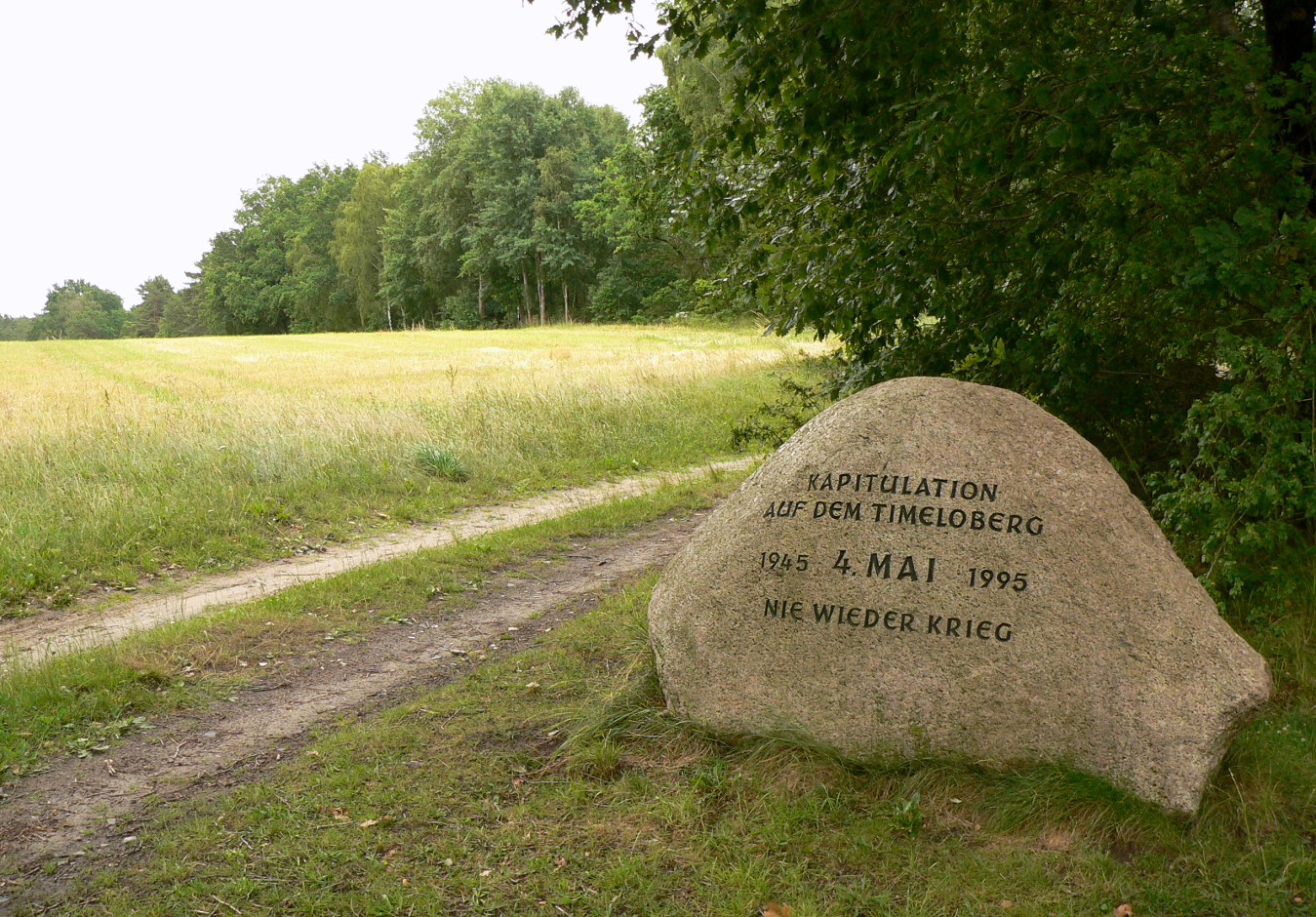 Am 4. Mai 1995 am Rande des Timeloberges aufgestellter Gedenkstein zum Gedenken an die Unterzeichnung der Kapitulation am 4. Mai 1945. Aufstellung außerhalb des Übungsplatzes bei Wendisch Evern